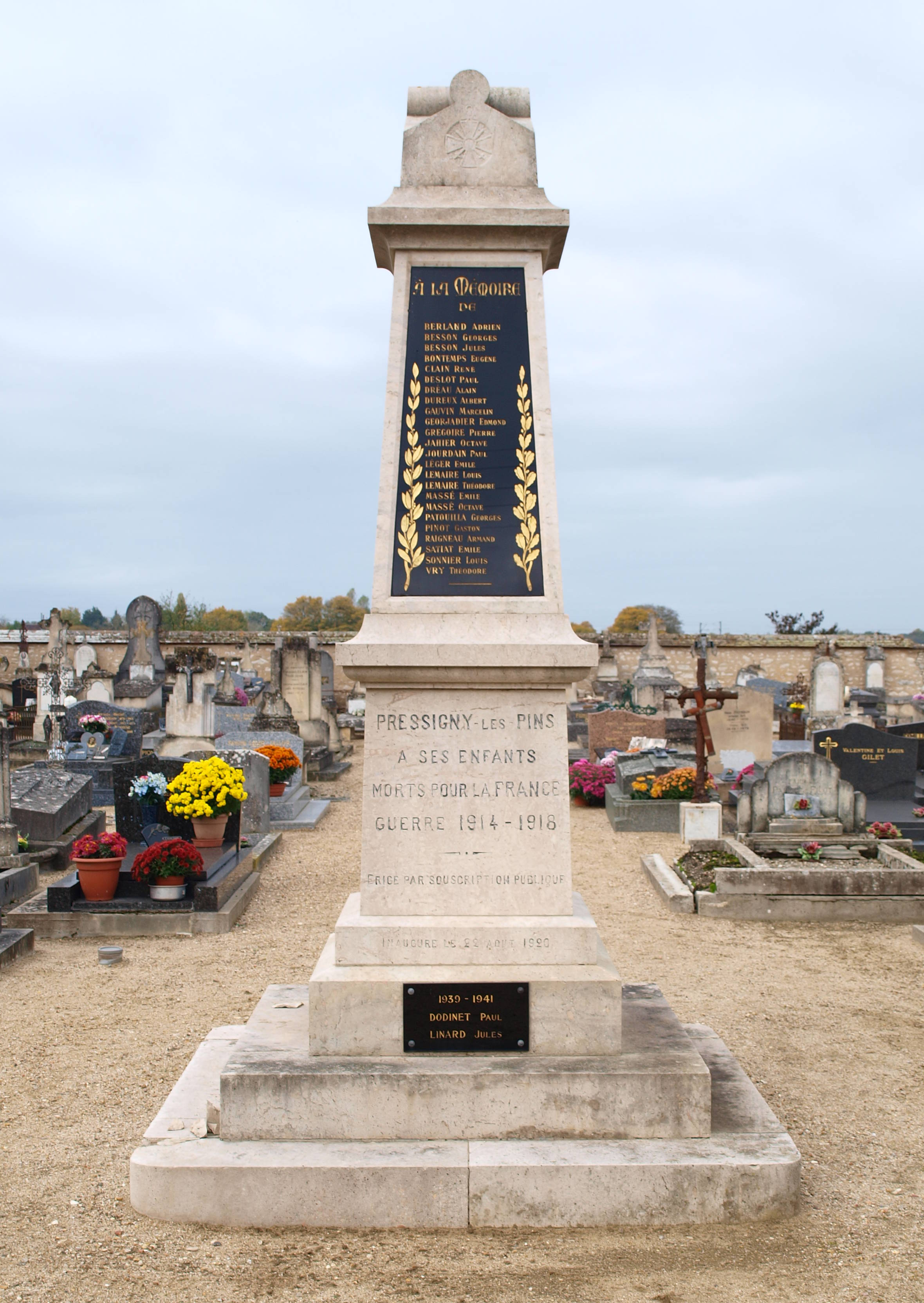 Pressigny-les-Pins (Loiret, France) ; monument aux morts, dans le cimetière.